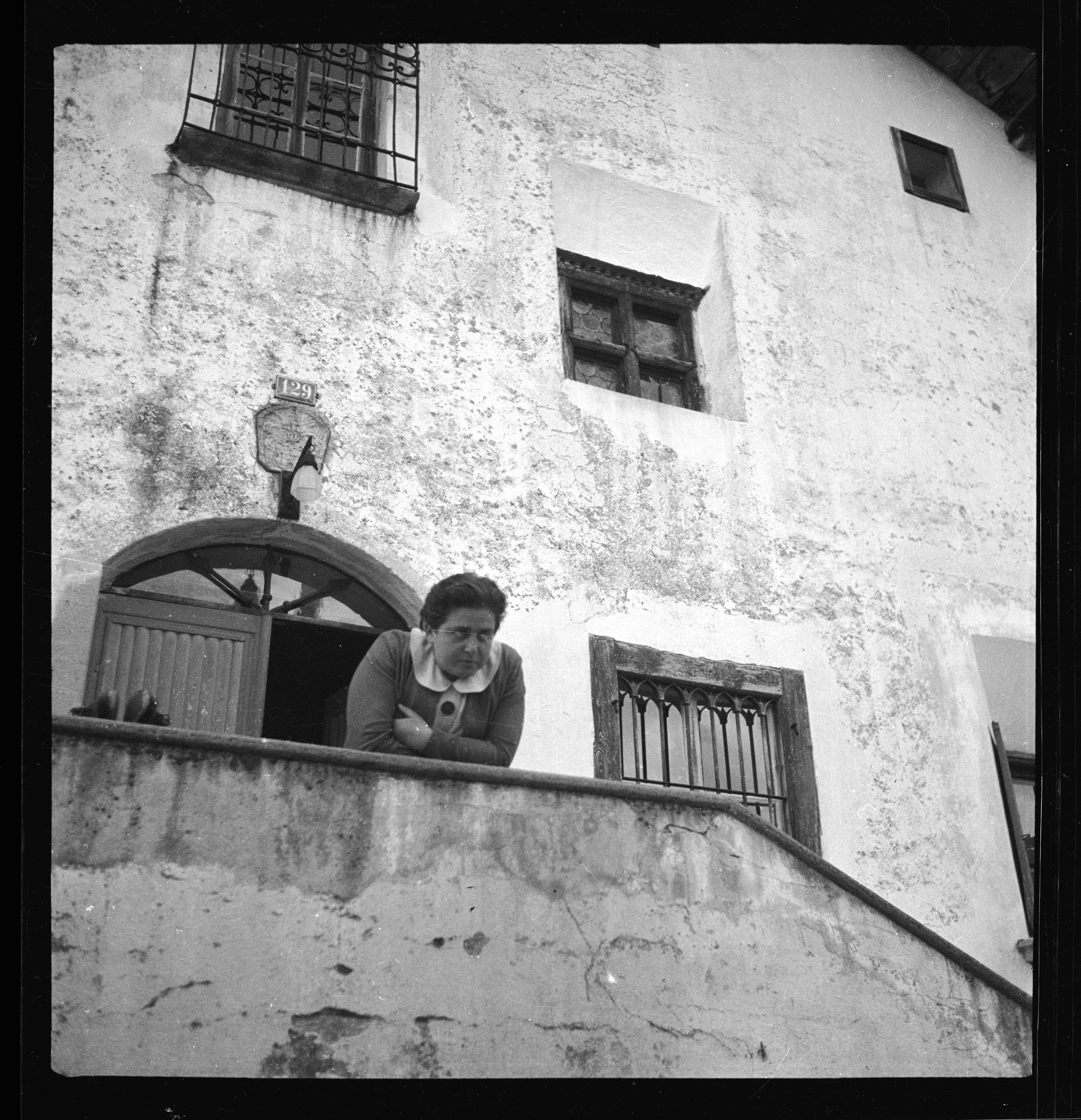 Schweiz, Sils: Menschen; Therese Giehse auf der Treppe vor der Chesa Salis; Segl